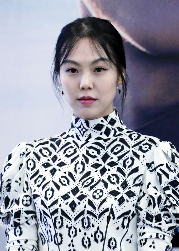 2015년 9월 17일 지금은 맞고 그때는 틀리다 시사회에서 김민희.